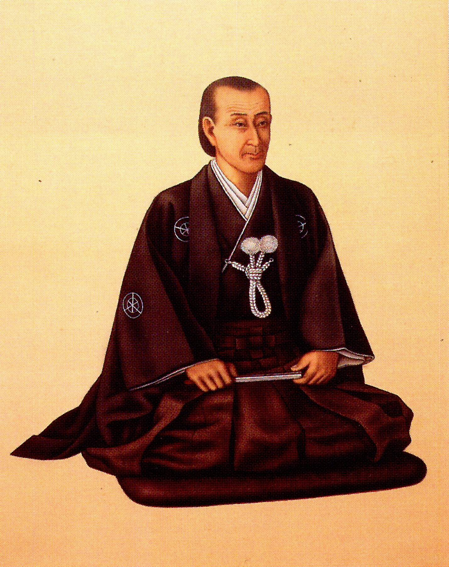 岡部長寛の肖像。